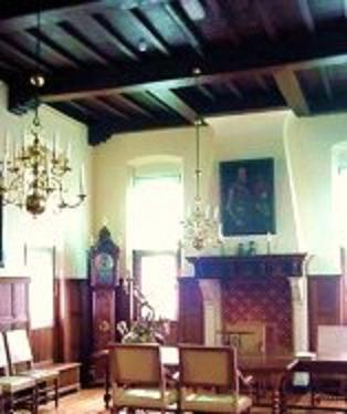 Interieur Stadhuis te Hasselt(Ov.)